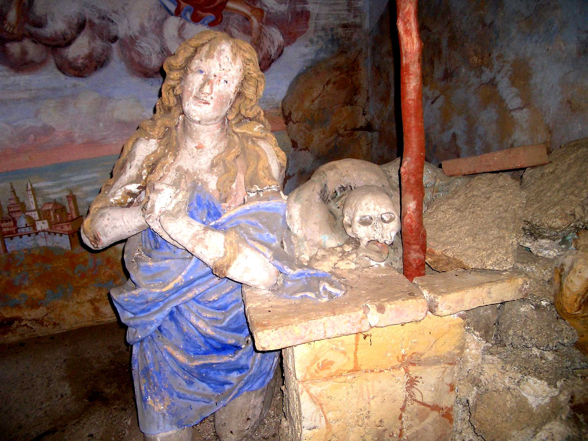 Sacro Monte di San Giovanni d'Andorno, Chapel of Mary Magdalene, XVII century, Campiglia Cervo (Biella), Italy